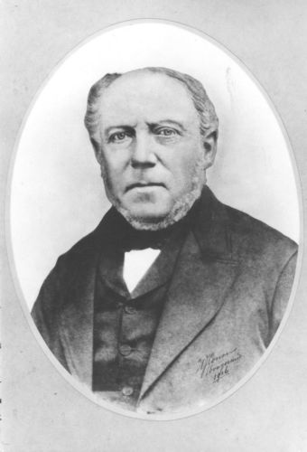 Menno Jans ter Haseborg, burgemeester van Hoogezand